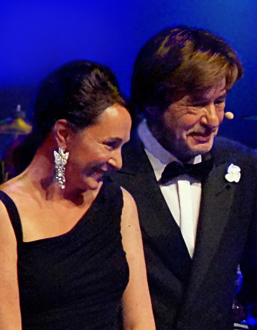 Claudia Hessel und Jörg Draeger beim KölnBall 2016.